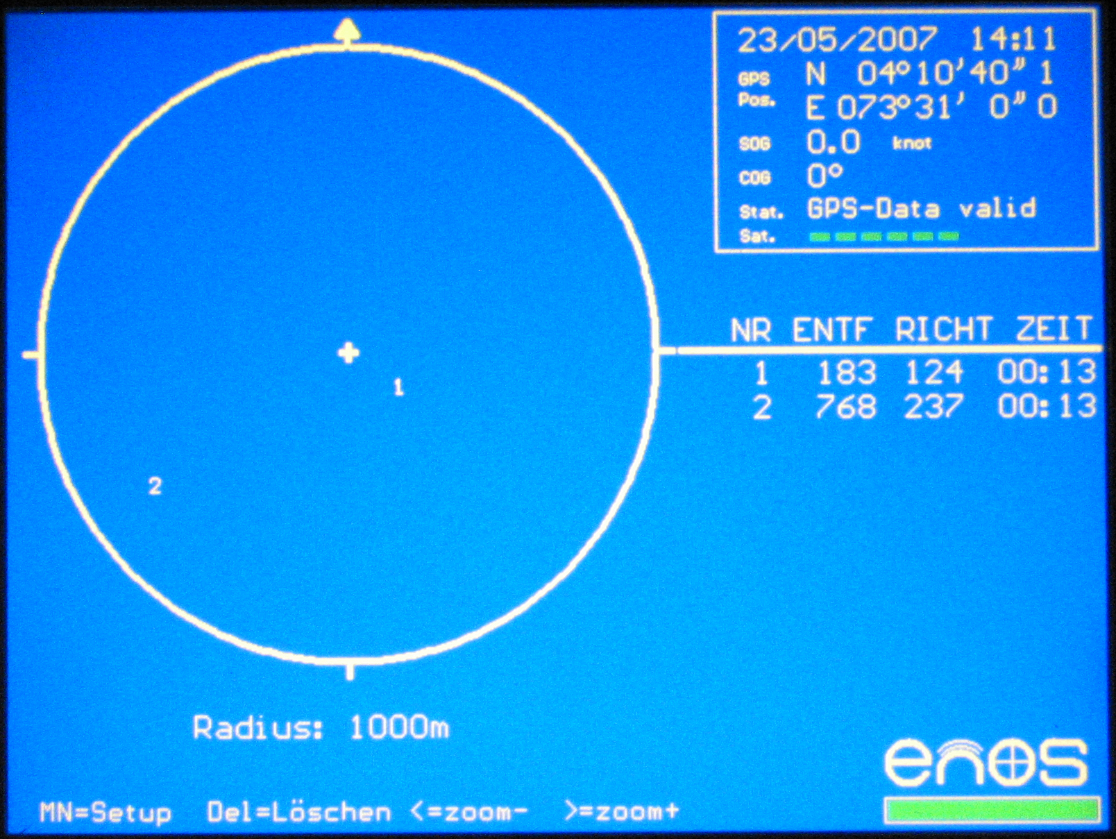 Bildschirmanzeige des ENOS-Empfängers